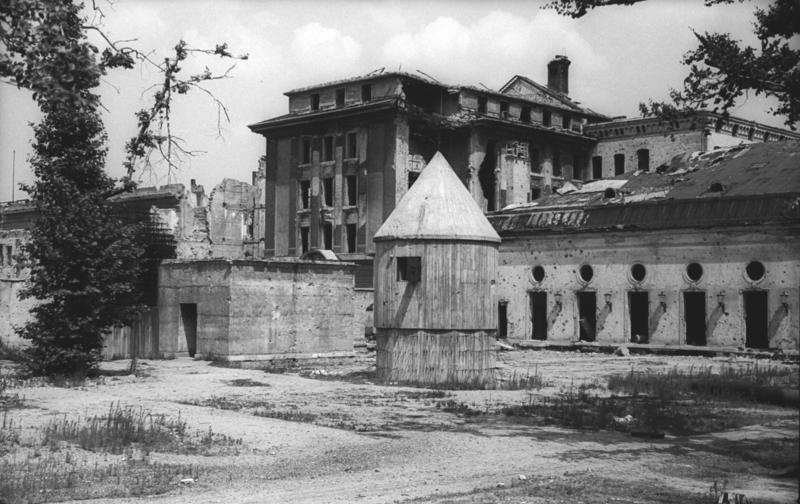 ADN-ZB/Archiv Berlin Der sogenannte "Führerbunker" im Garten der im II. Weltkrieg zerstörten Reichskanzlei. Links der Eingang, in der Mitte der Bombenunterstand für die Wache. Aufn. Juli 1947 Information added by Wikimedia users.vor der alliierten Sprengung, danach siehe Bundesarchiv Bild 183-M1204-318, Berlin, zerstörte Reichskanzlei.jpg Bundesarchiv Bild 183-M1204-319, Berlin, Reichskanzlei, gesprengter Führerbunker.jpg